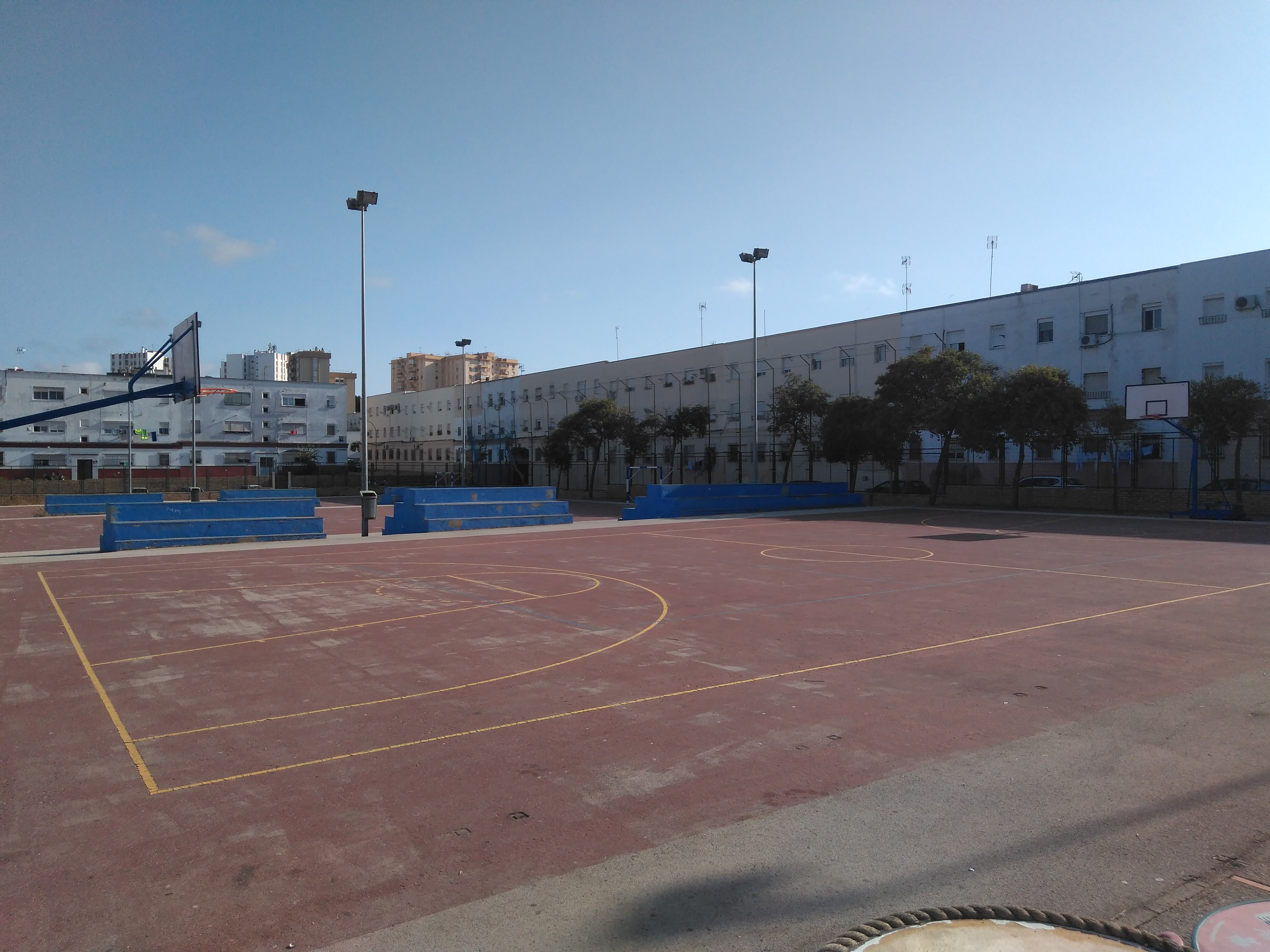 Polideportivo de La Asunción en Jerez de la Frontera (España)